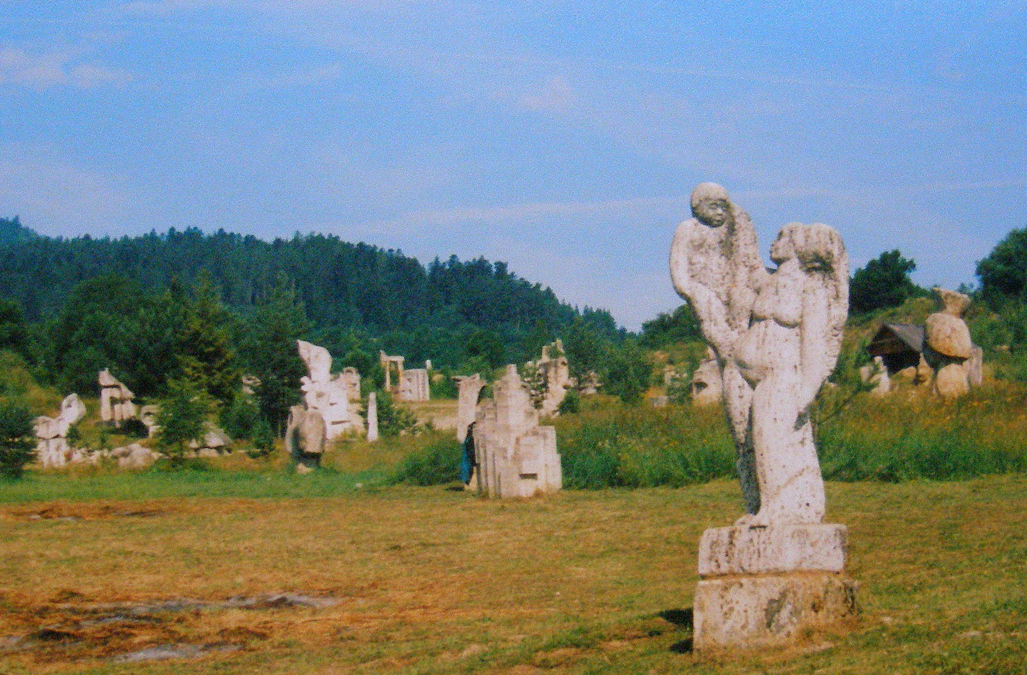 Areál plenéru s vystavovanými sochami. Vyšné Ružbachy.